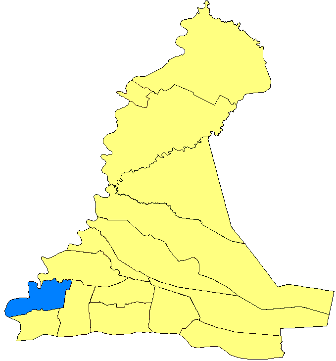 Mapa de Humaitá, Paraguay